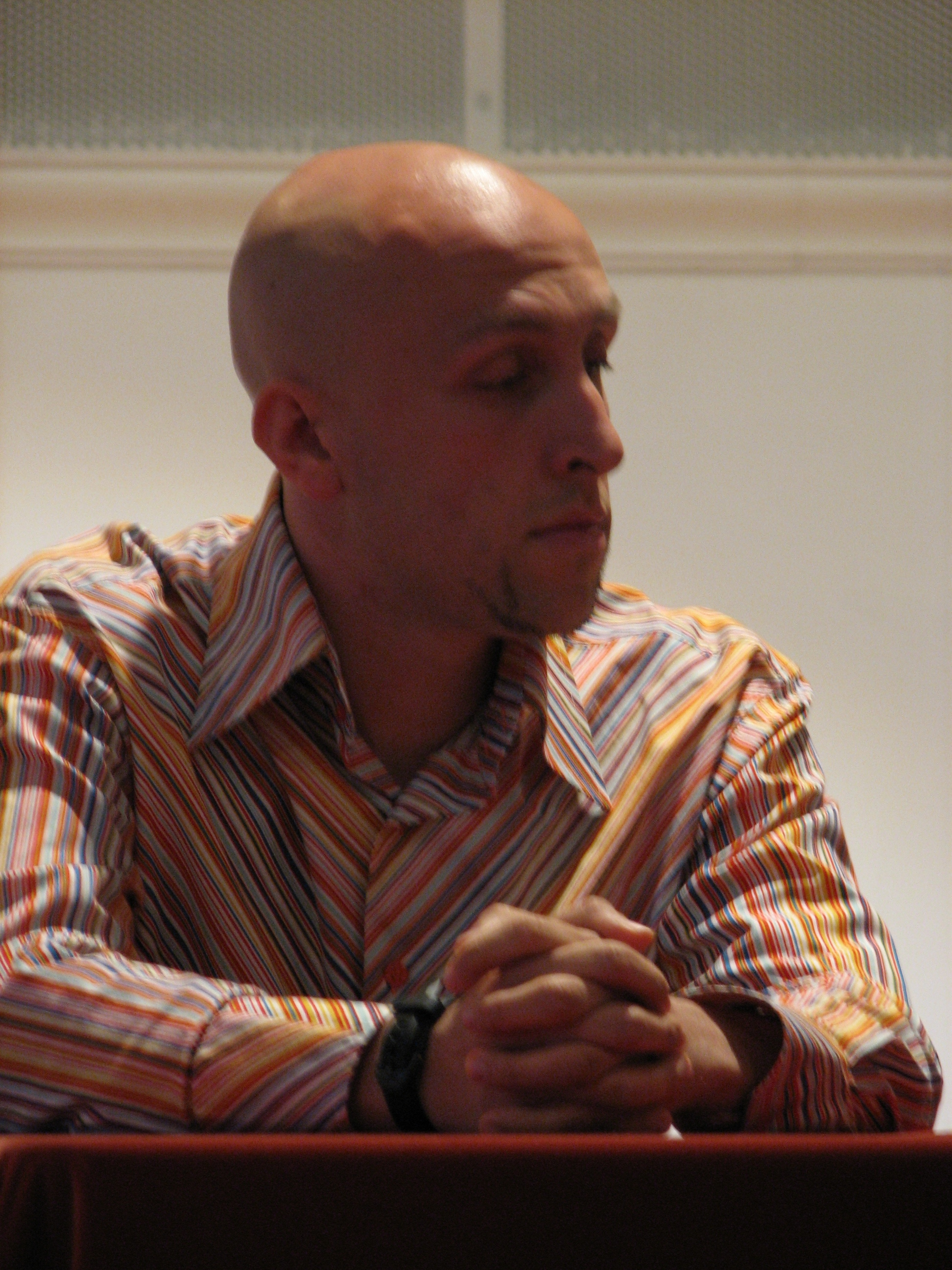 David Bandelj. Slika je moje avtorsko delo in je bila posneta, ko je imel David Bandelj govor na šoli.